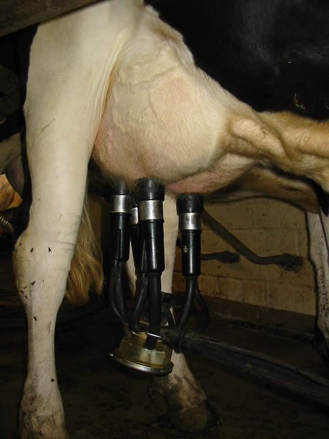 Melkgeschirr am Euter einer Schwarzbunten